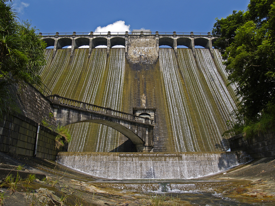 香港仔上水塘